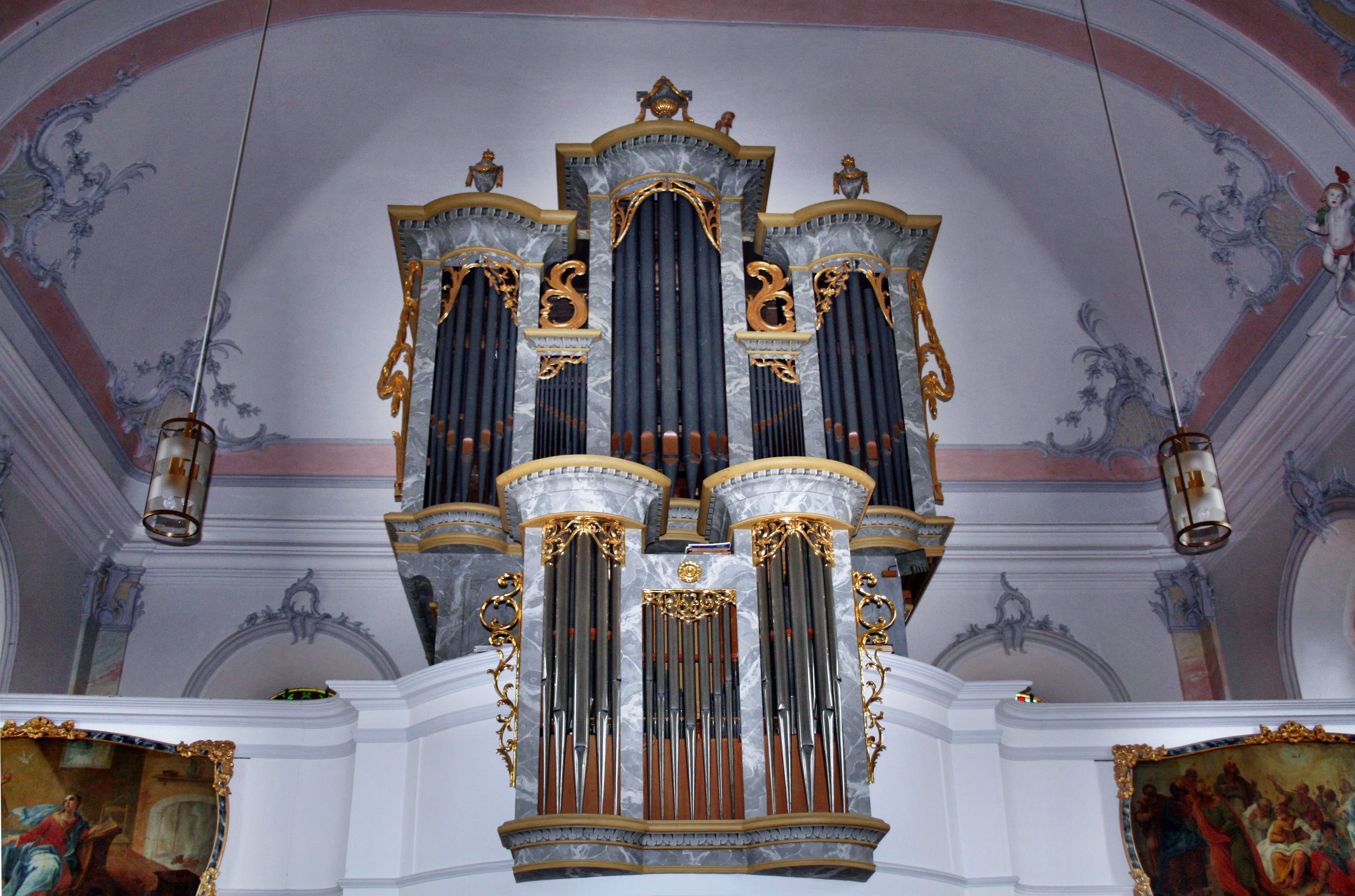 Die Orgel von 1792, St. Martin Memmingen-Steinheim